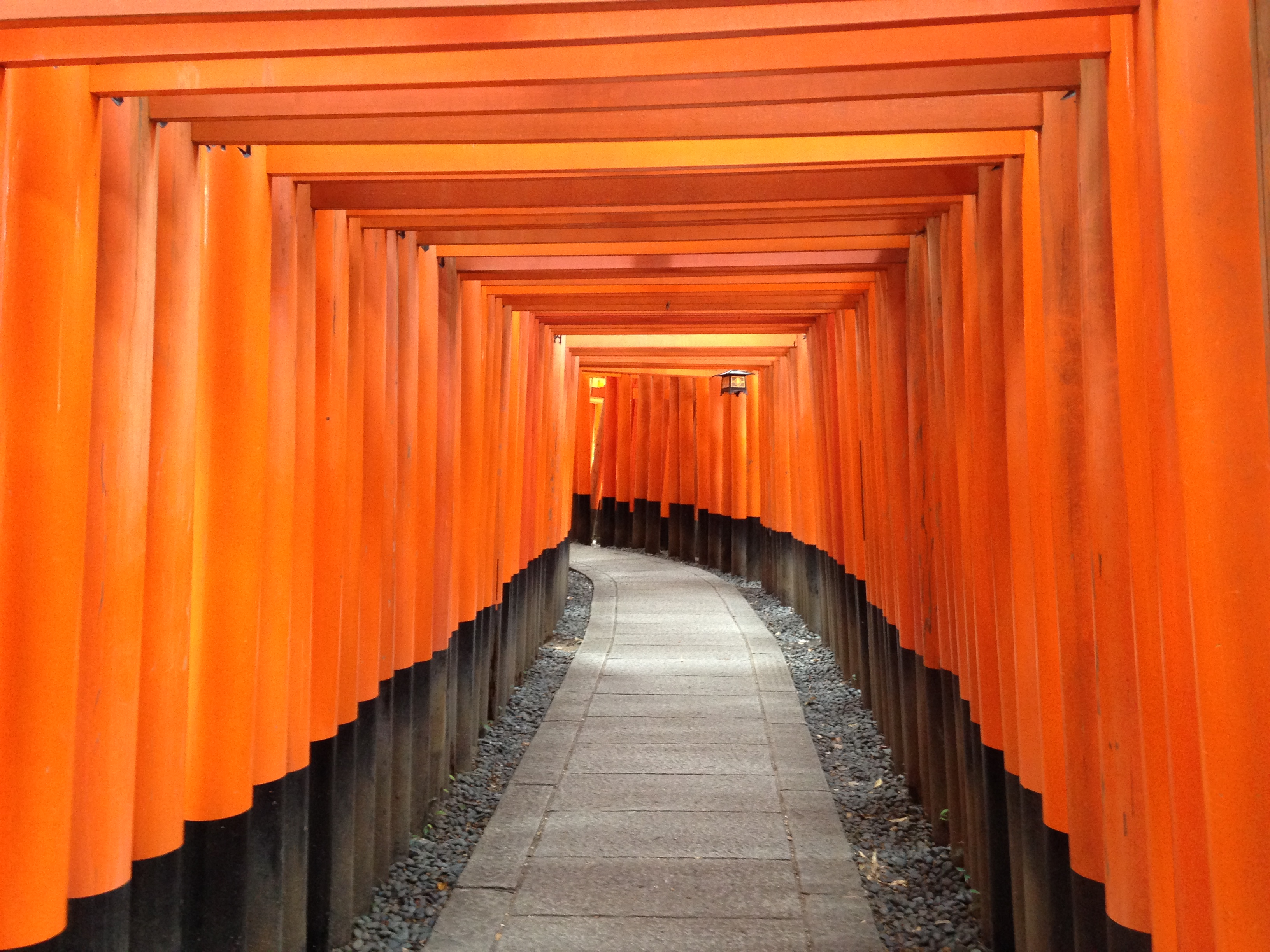 伏見稲荷大社・千本鳥居